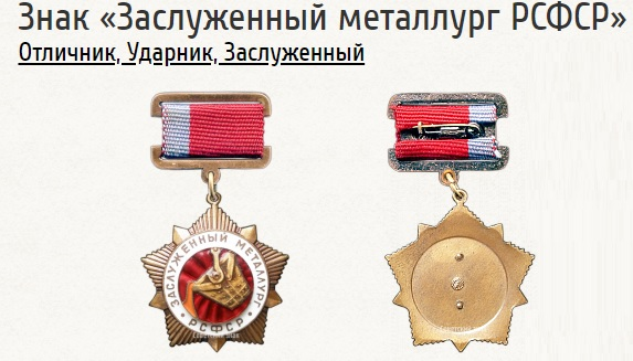 Медаль Заслуженный металлург РСФСР